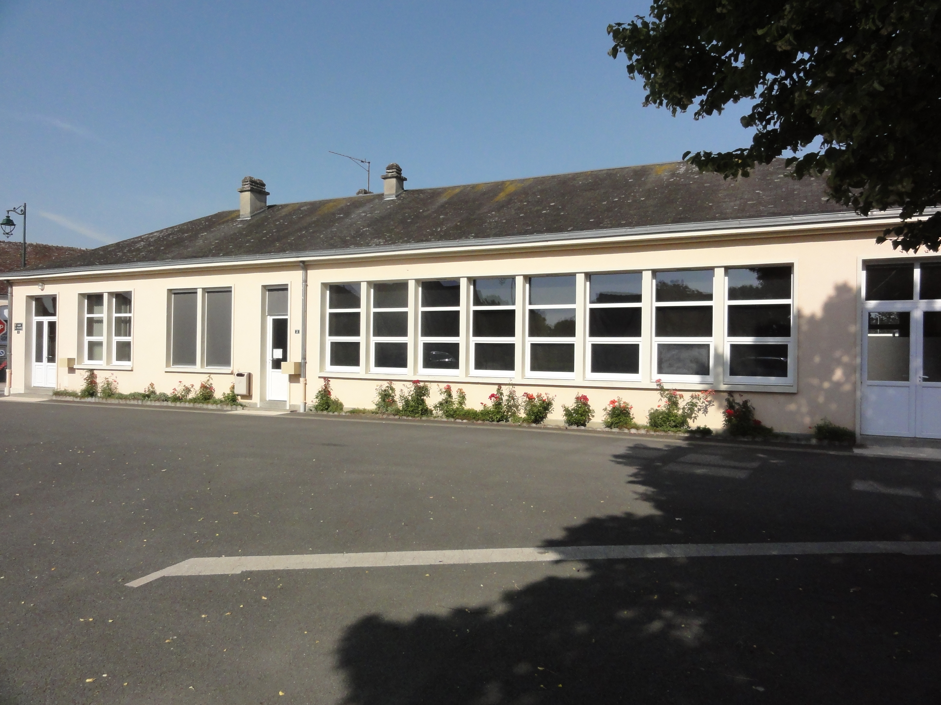 Dangeul (Sarthe) salle des fêtes